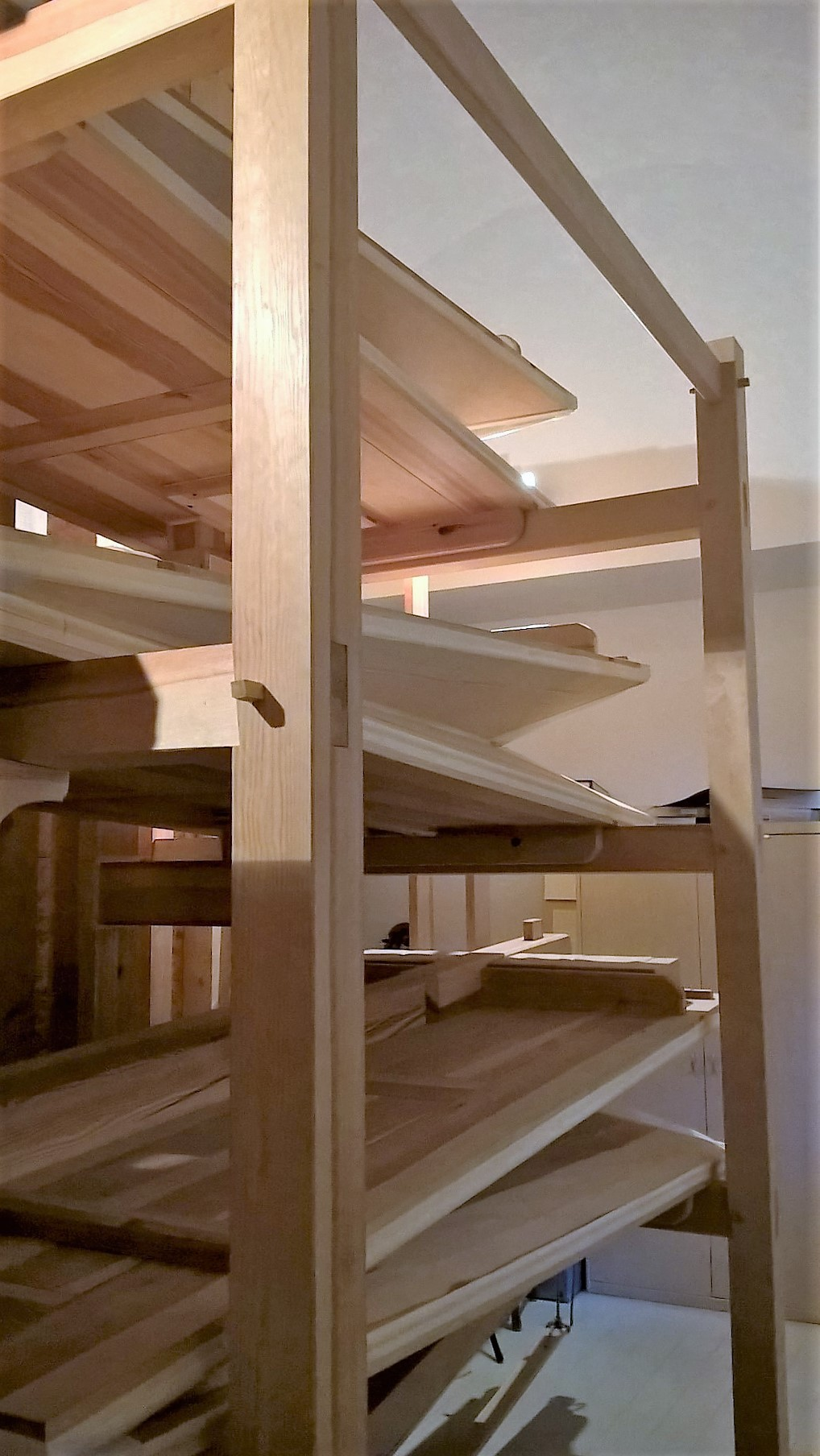 Orgel der Kirche Zur Frohen Botschaft, Berlin-Karlshorst, Deutschland